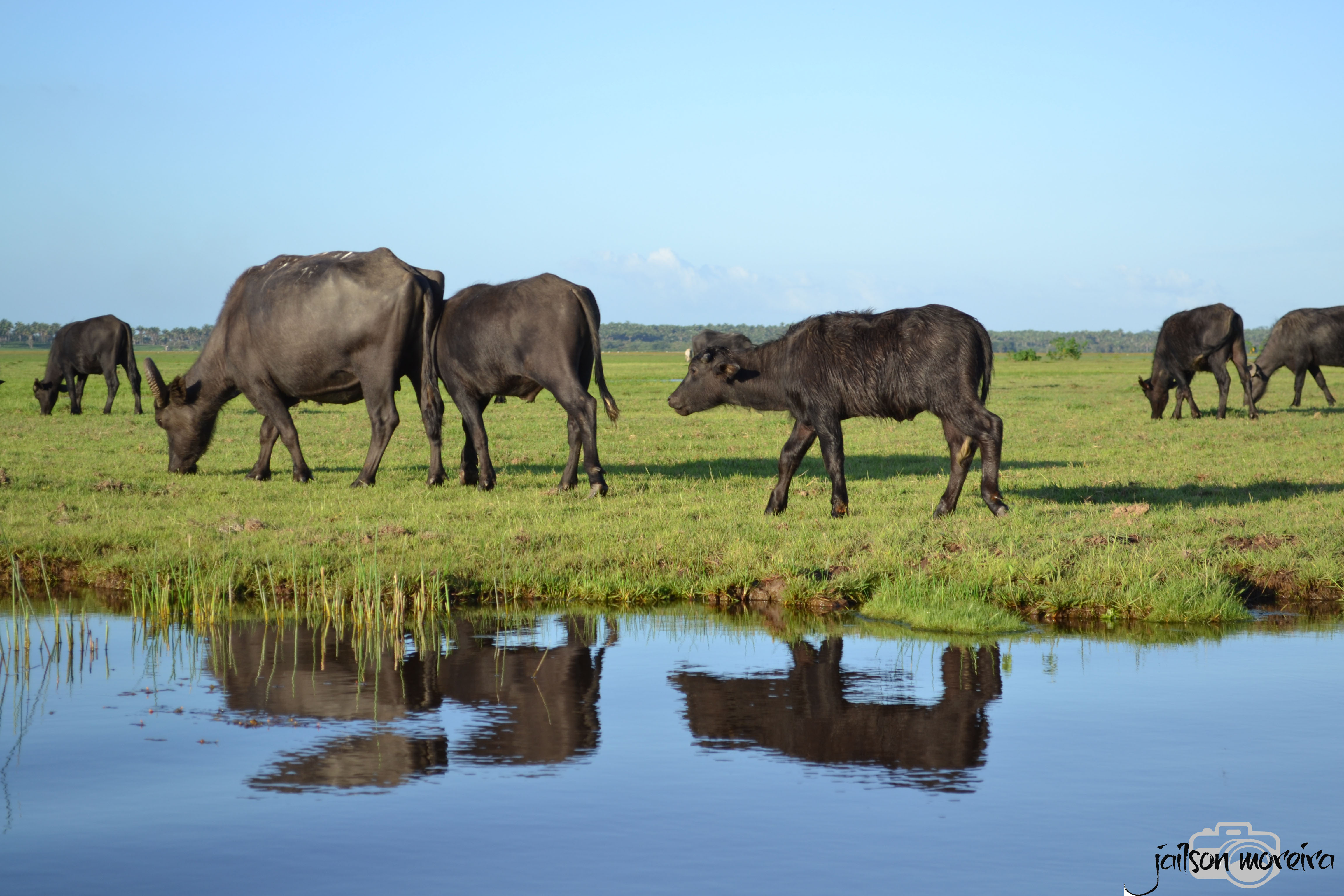 Criação de búfalos (Rio Pericumã)